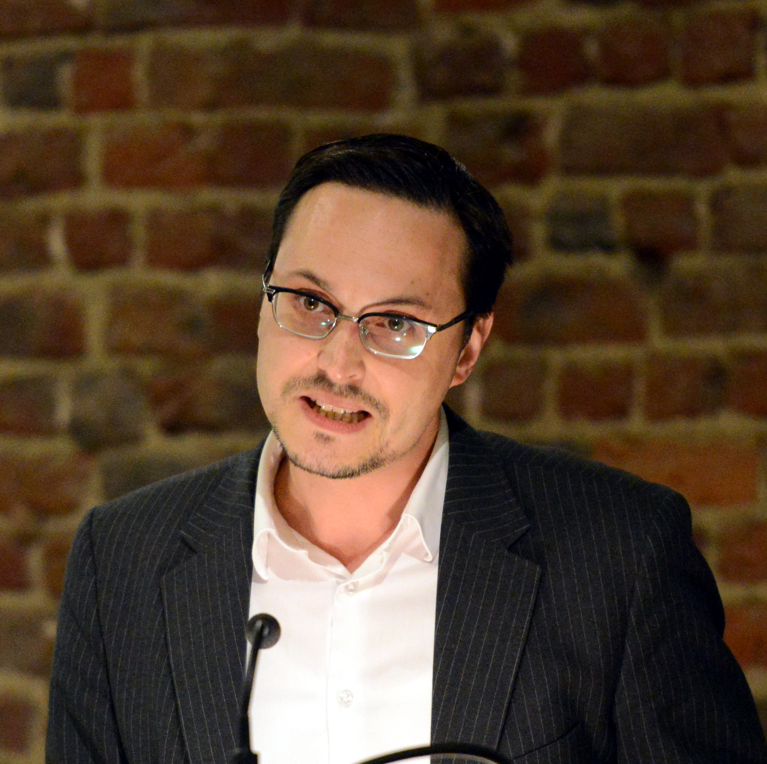 De Claude D. Conter bei der Presentatioun vun der Germaine Goetzinger hirem Buch Wuertwiertlech. 57 Rieden, den 11. November 2013 am Waassertuerm + Pomhouse zu Diddeleng.